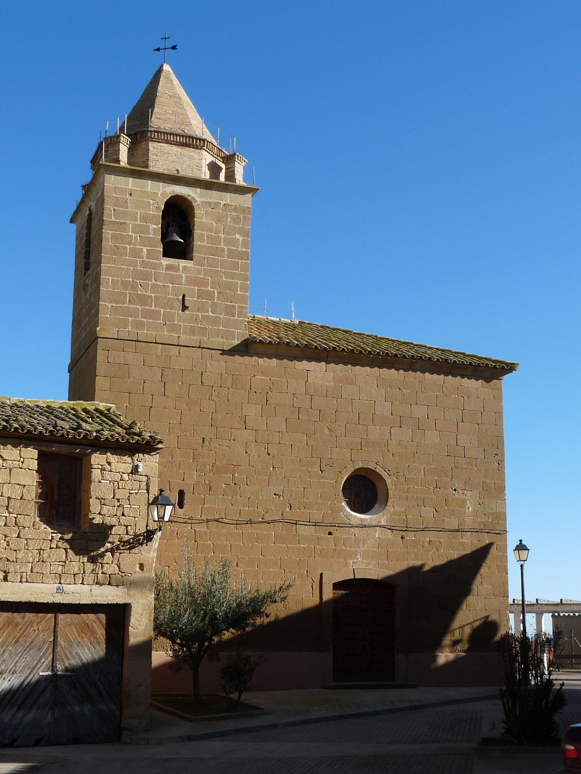 Barbués - Iglesia de Nuestra Señora de la Asunción (siglos XVI a XIX)